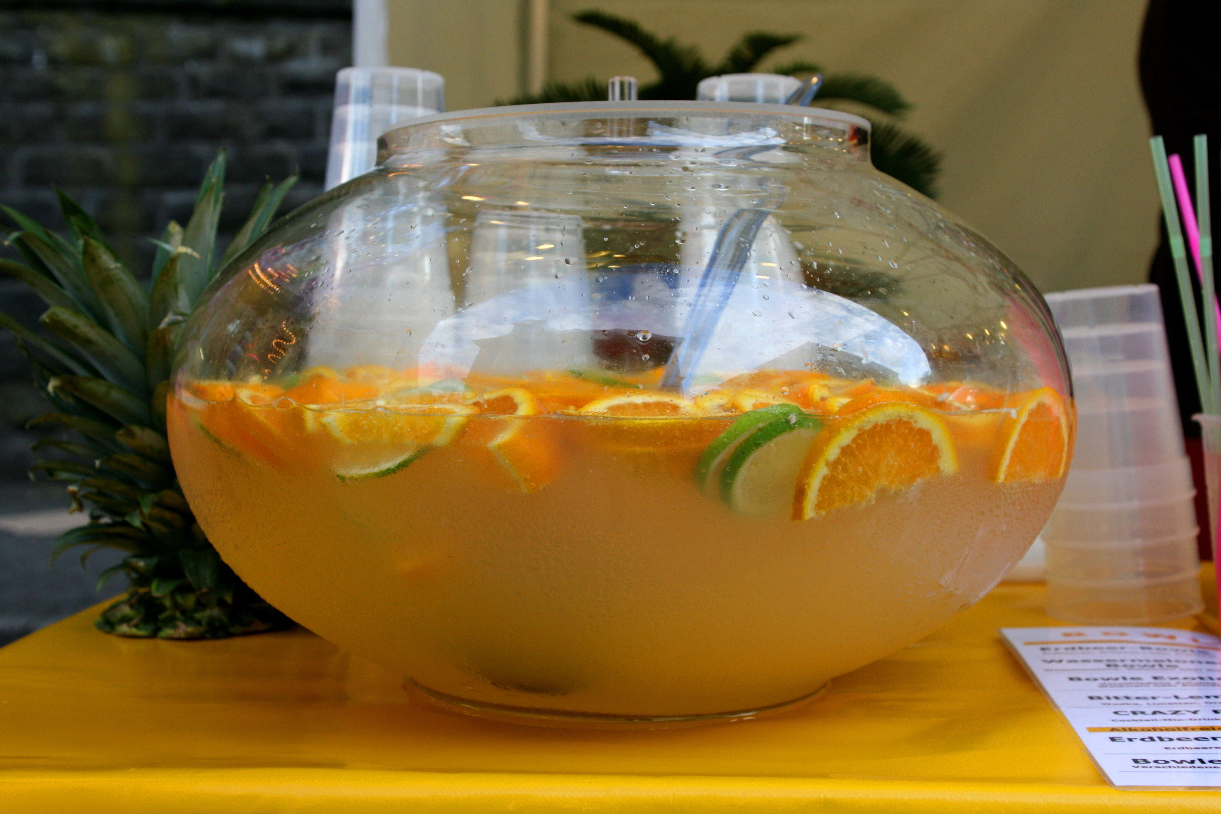 1. Hückeswagener Bierbörse, Bahnhofstraße und Bahnhofplatz in Hückeswagen